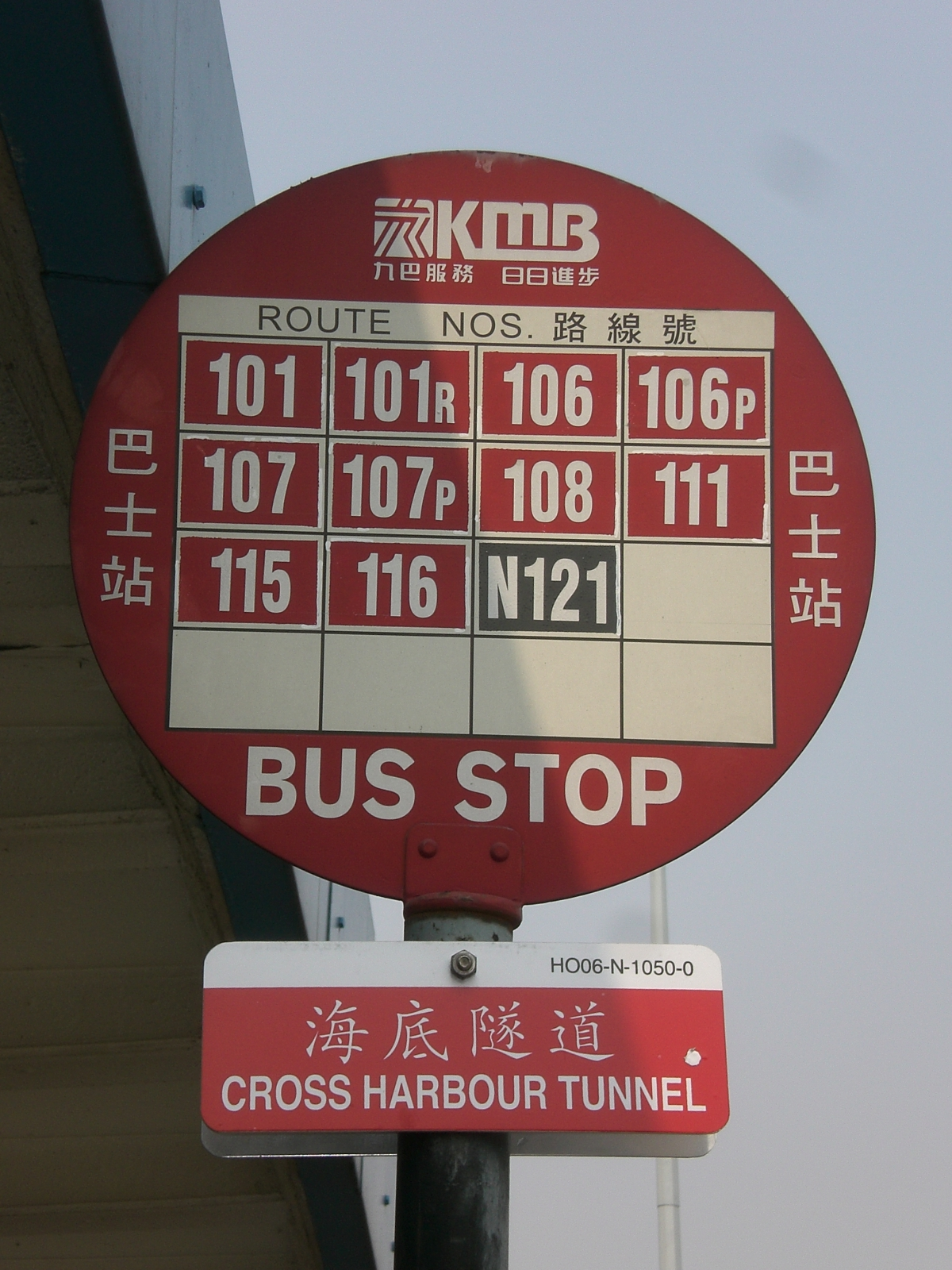 過海隧道巴士101線分站, 紅磡香港海底隧道